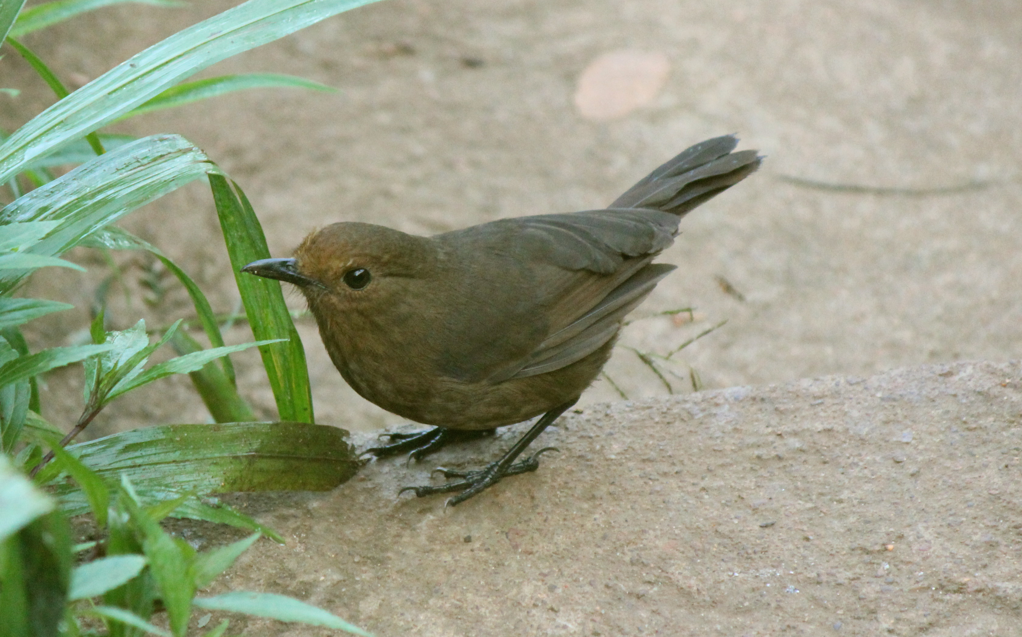 Own work of Buddhika Mawella